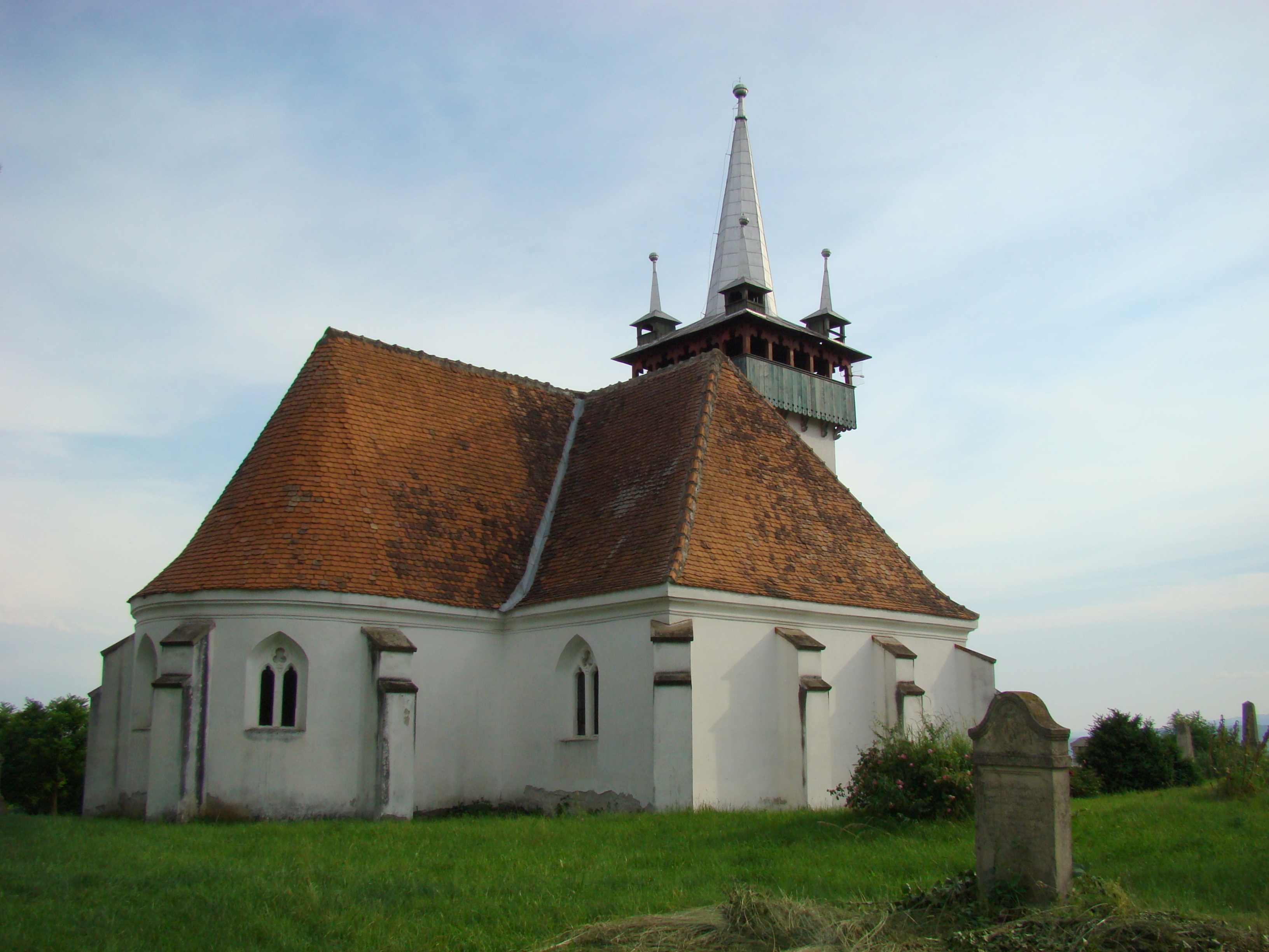 Biserica reformată, sat aparținător Ciumbrud; municipiul Aiud 01